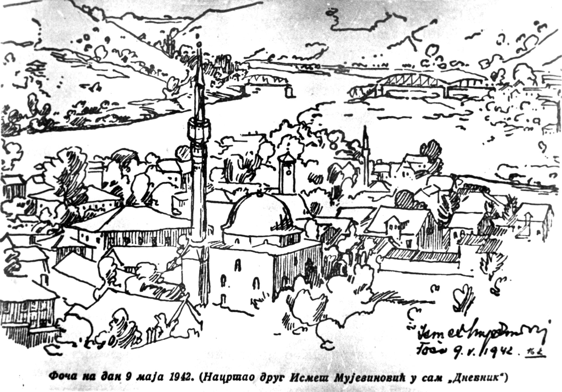 Srpskohrvatski / српскохрватски: Foča 9. maja 1942. godine. Crtež Ismeta Mujezinovića.